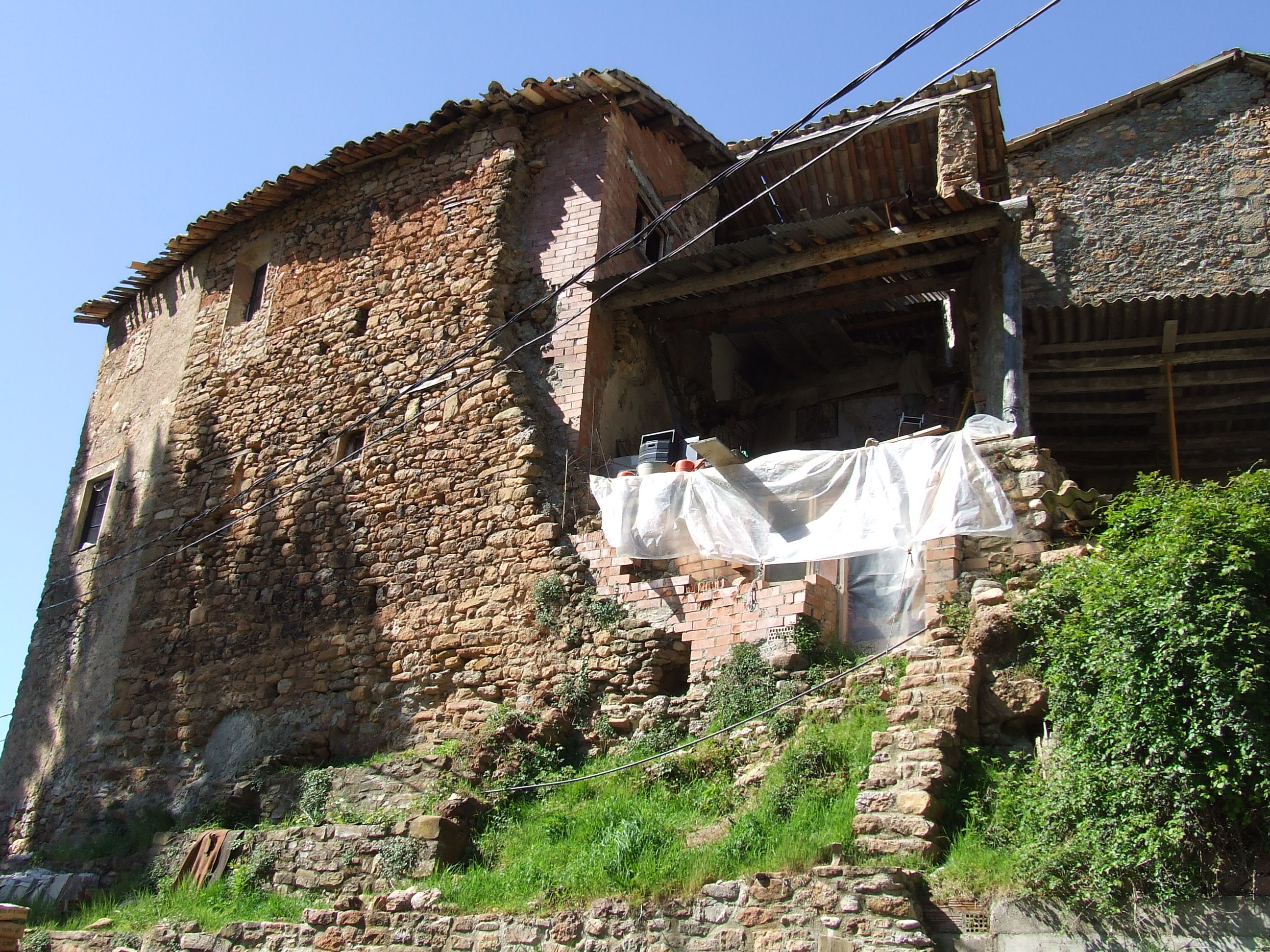 Paret de Cal Servent, de factura medieval (Gurp de la Conca, Tremp, Pallars Jussà)